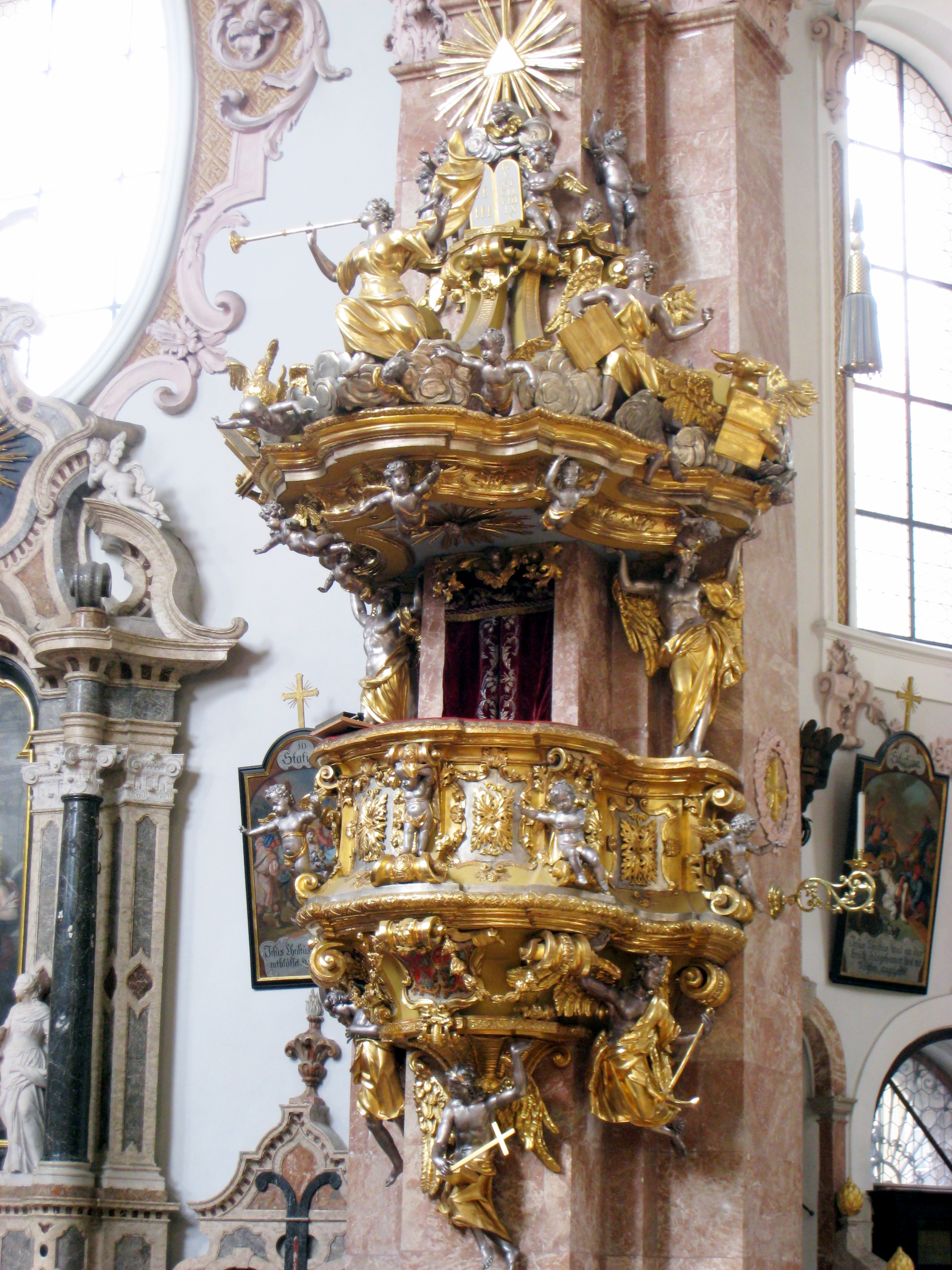 Dom zu St Jakob, Innsbruck, Austria.